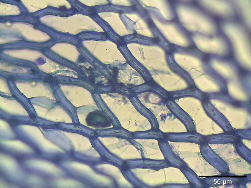 Sphagnum warnstorfii, Stammblatt-Zellen, 400x